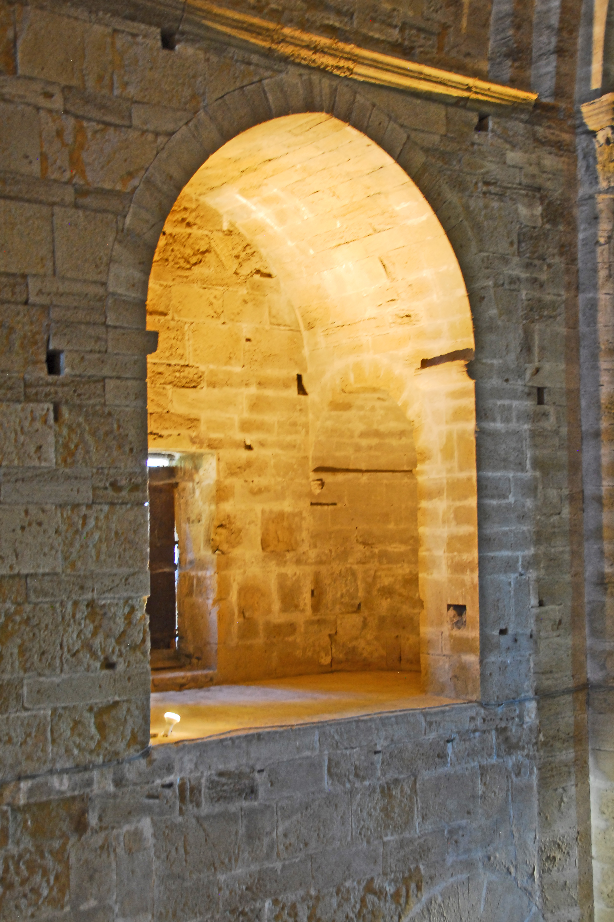 St-Pierre-et-St-Paul de Maguelone, südl. Hochkapelle